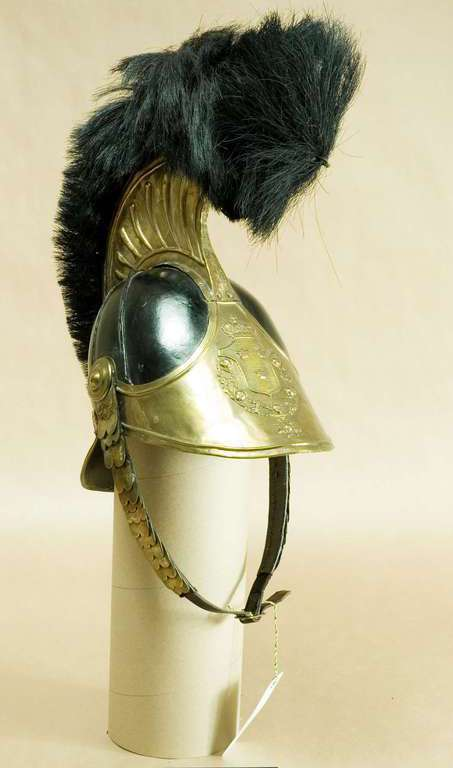 Hjälm m/1823 för manskap vid Livregementets dragoner Armémuseums inventarienummer: 31447